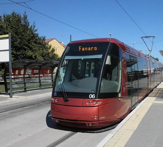 Un convoglio in via Monte Celo.